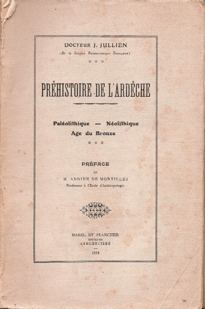 Couverture d'un ouvragage de Jos Jullien consacré a la préhistoire en Ardèche.